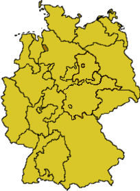 Ekd-bremen